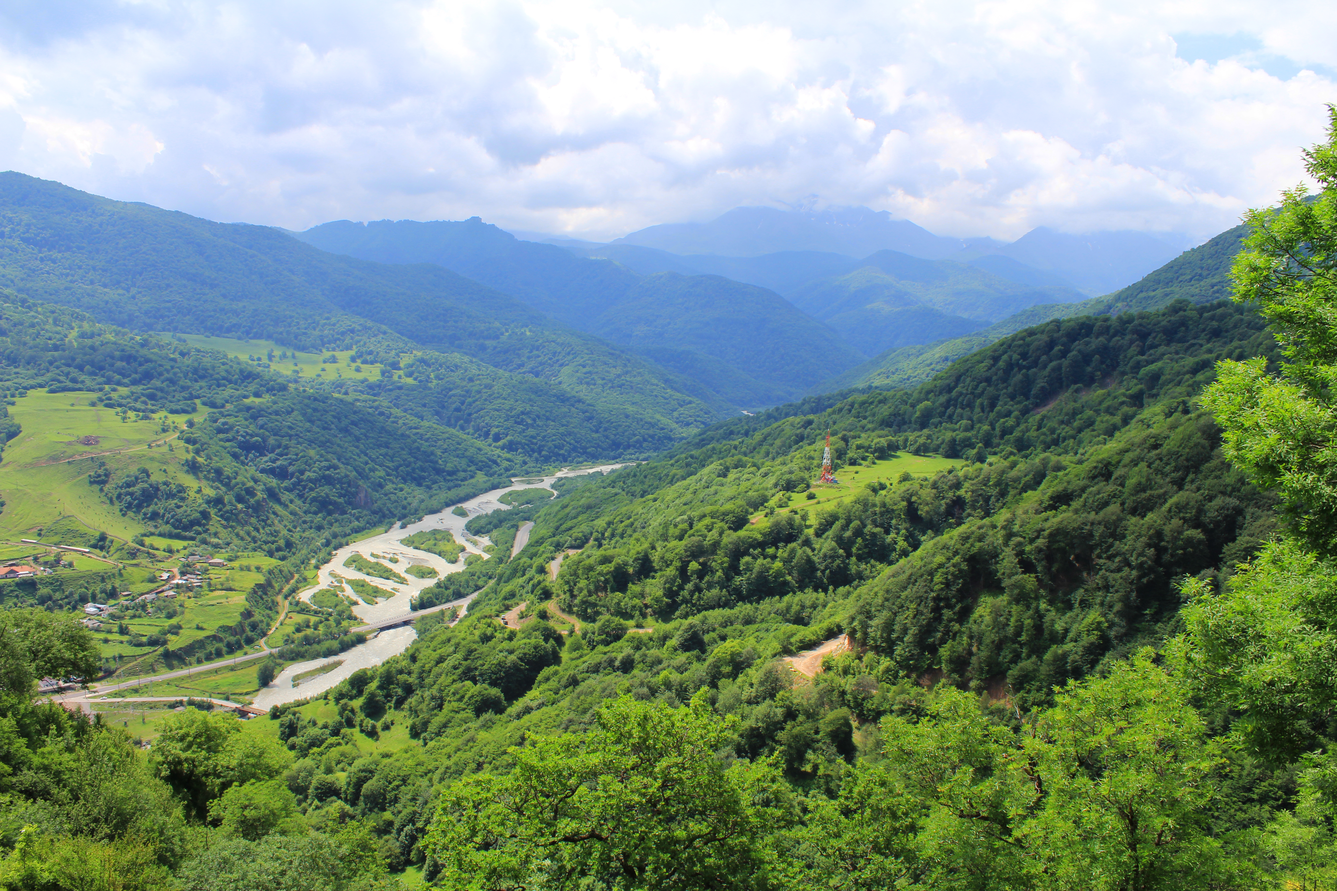 Теберда: Карачаевск, Карачаево-Черкесия This image is related to the protected area of Russia number 0900023